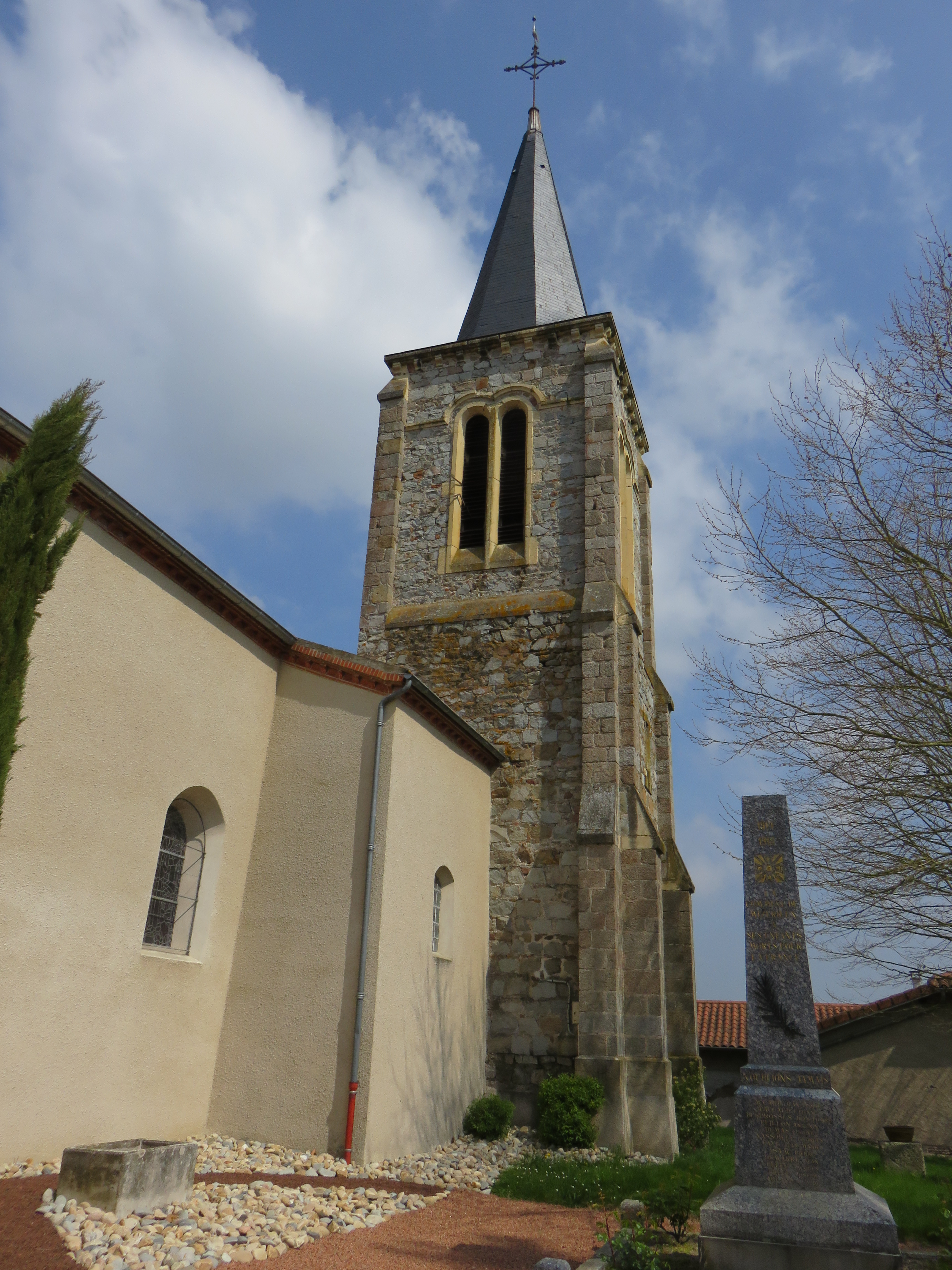 Église Saint-Fortunat de Mizérieux (Loire, France).